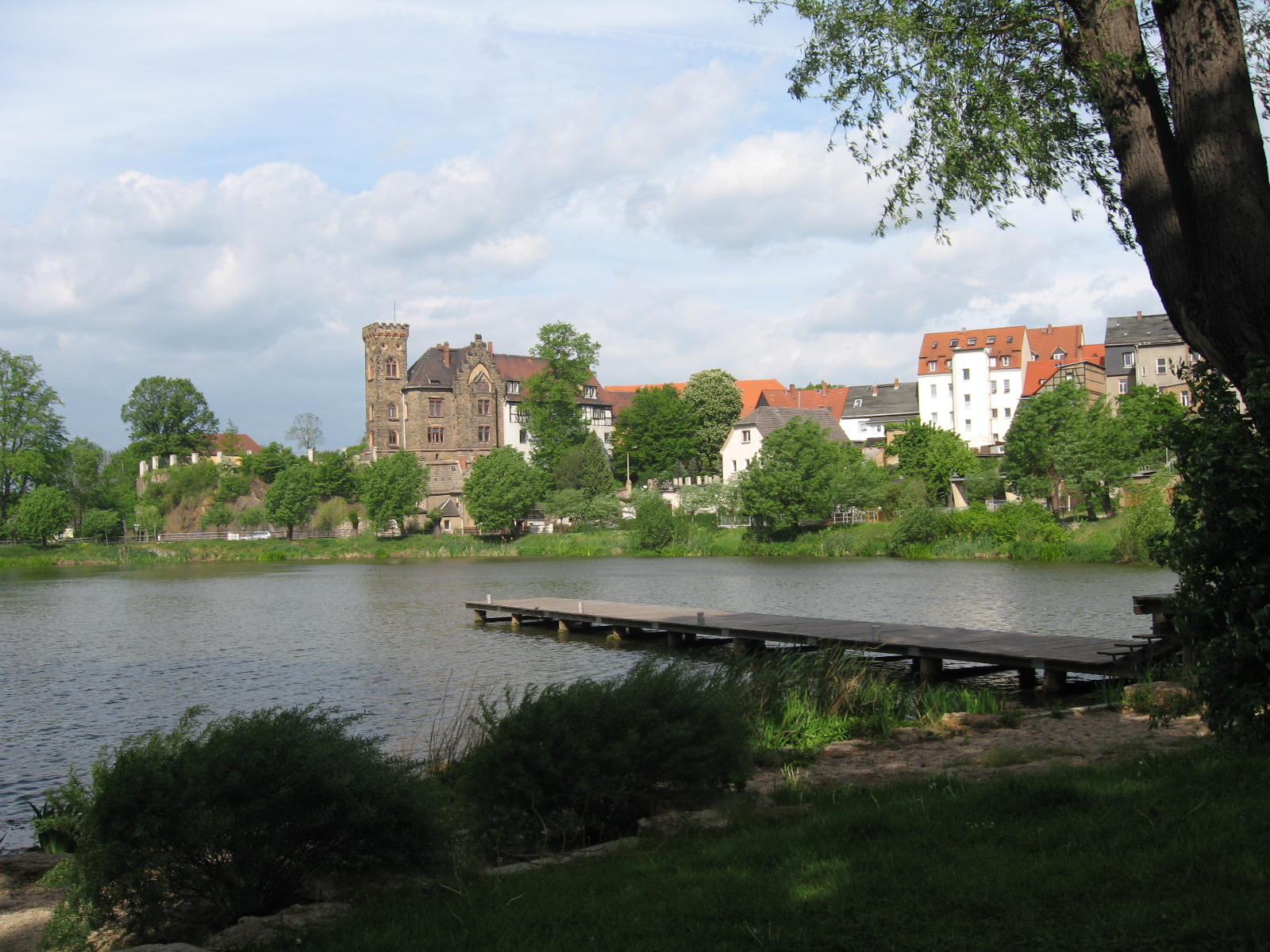 Ronneburg (Thüringen): Blick über den Baderteich aufs Schloss